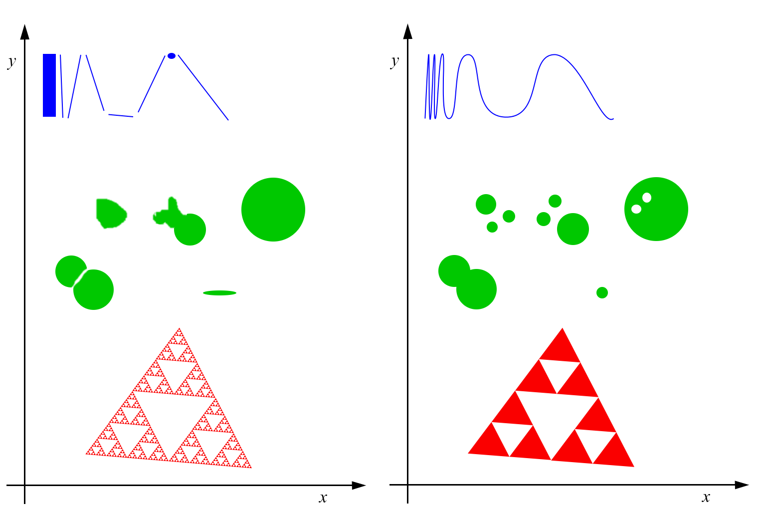 Die farbigen Mengen im linken Teilbild haben ziemlich geringen Hausdorff-Abstand zu den entsprechenden Mengen rechts